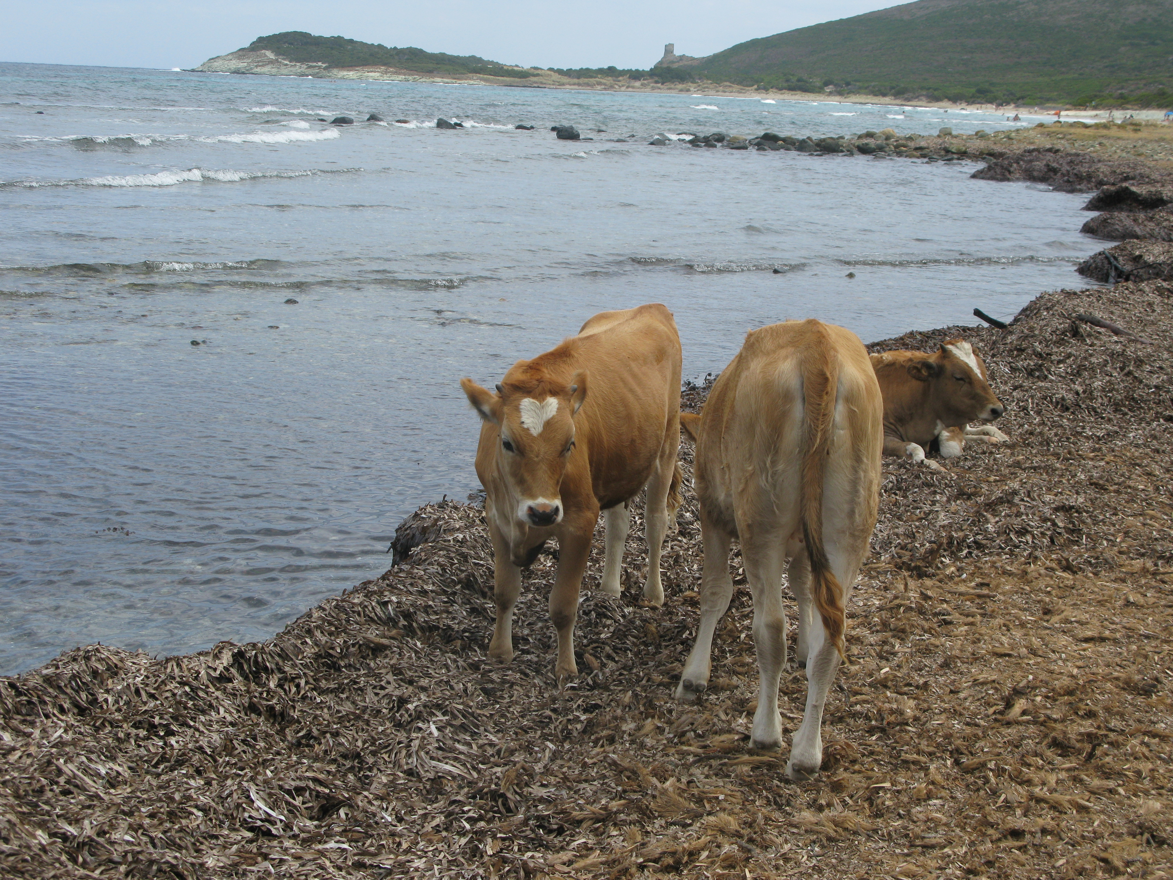 Veaux (bos taurus taurus) de race corse sur la plage de Barcaggio, Cap Corse.